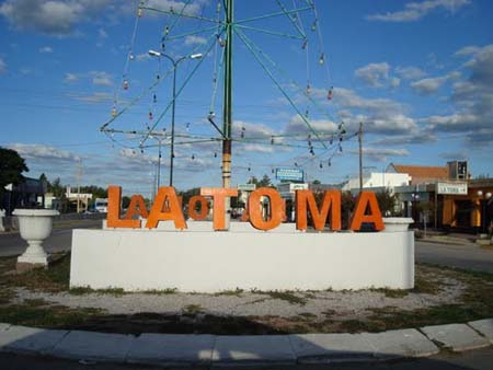 Rotonda central